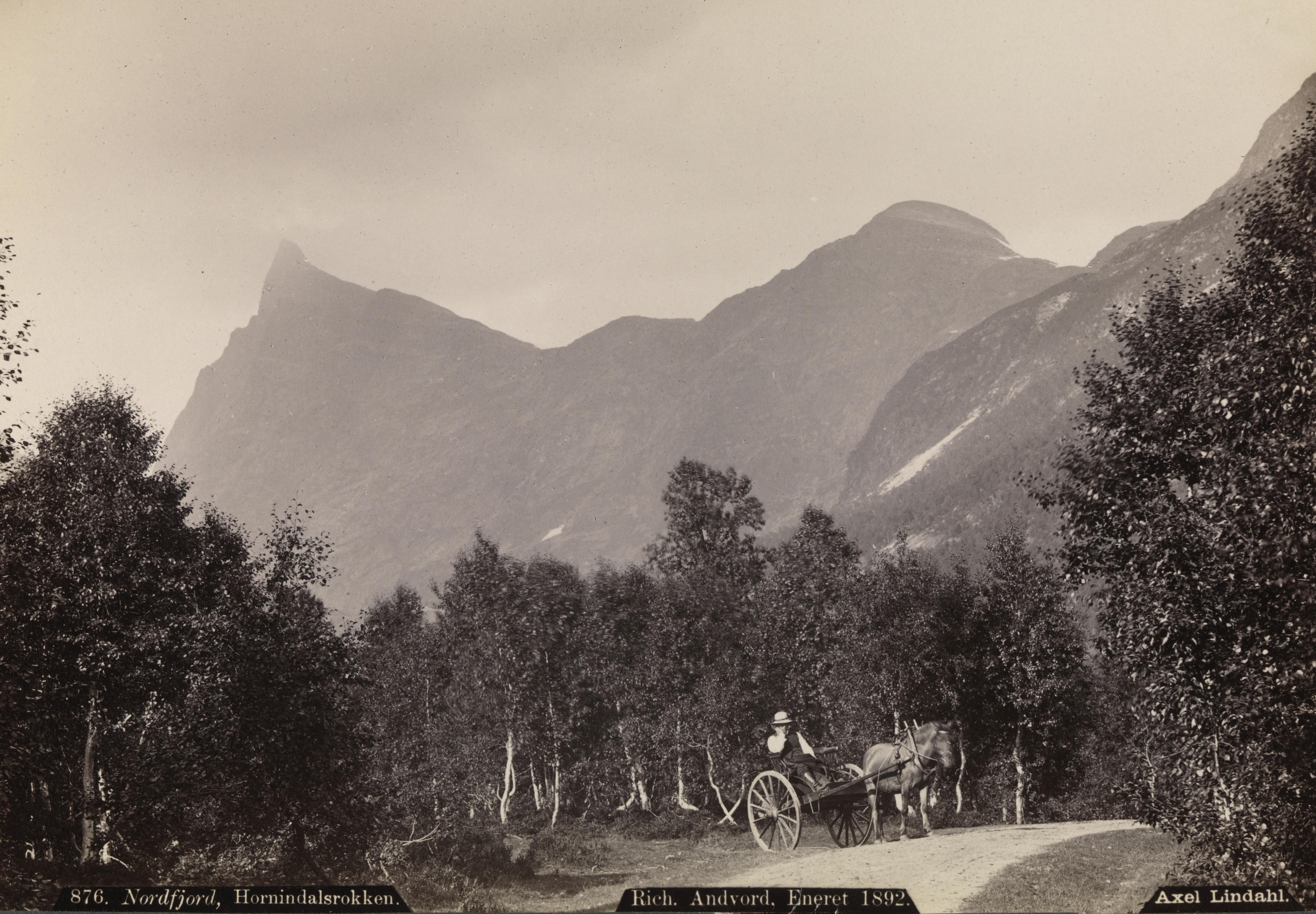 Bildet er hentet fra Nasjonalbibliotekets bildesamling Hornindalsrokken, Hornindal, Sogn og Fjordane